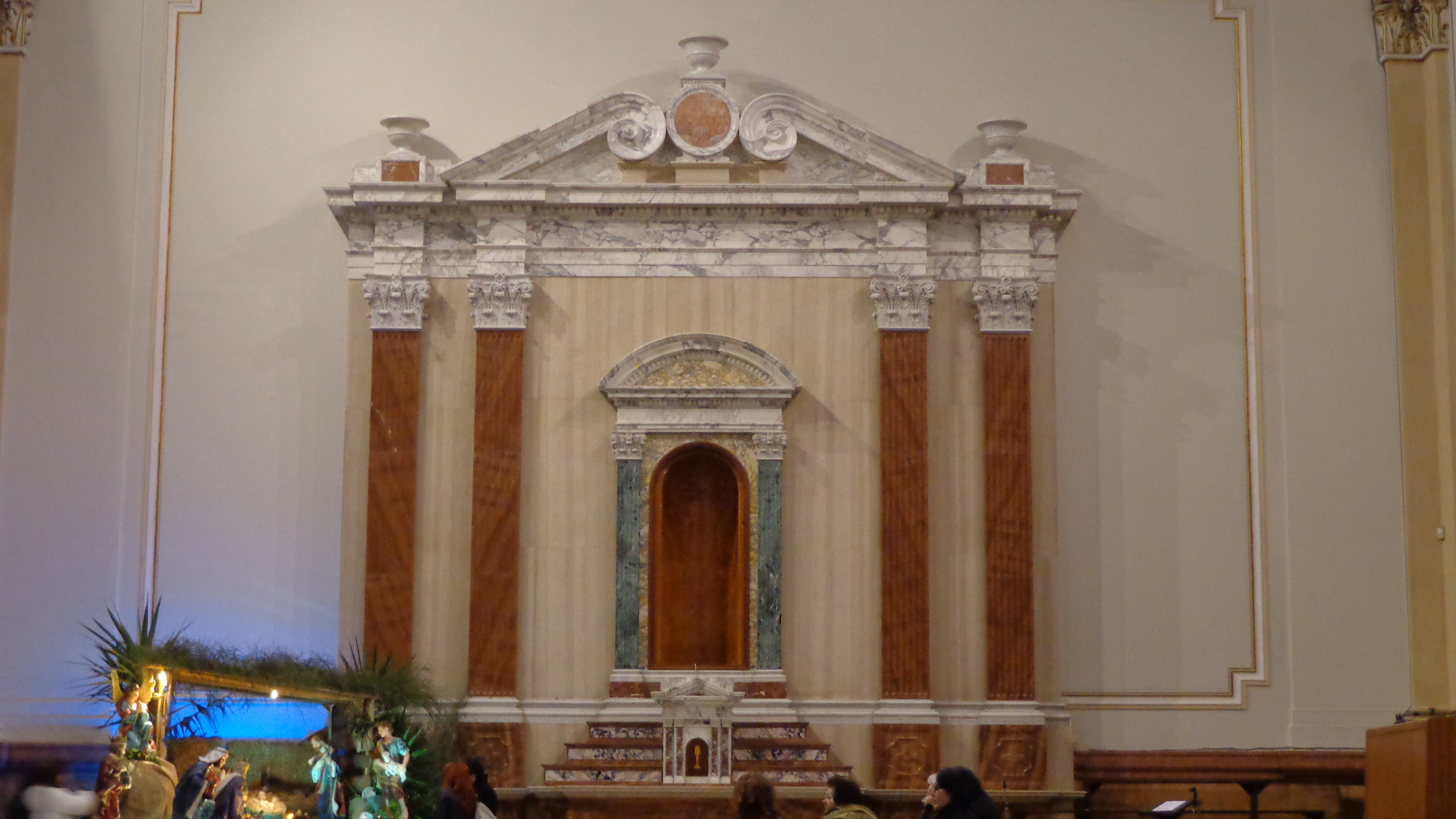 Altare San Sebastiano transetto destro